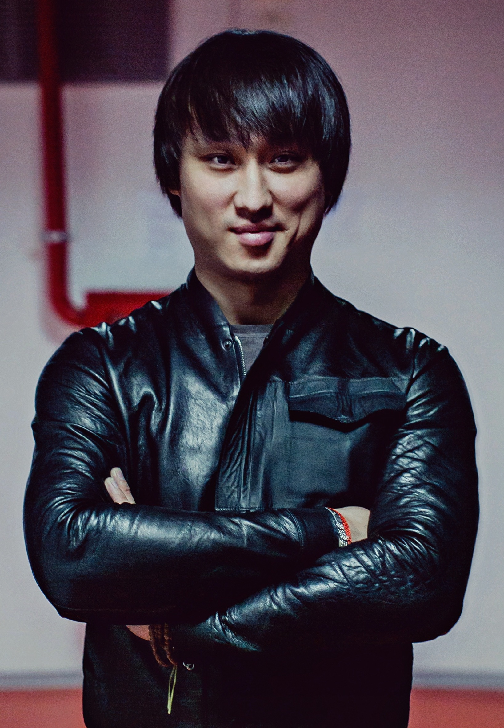 Сангаджи Тарбаев